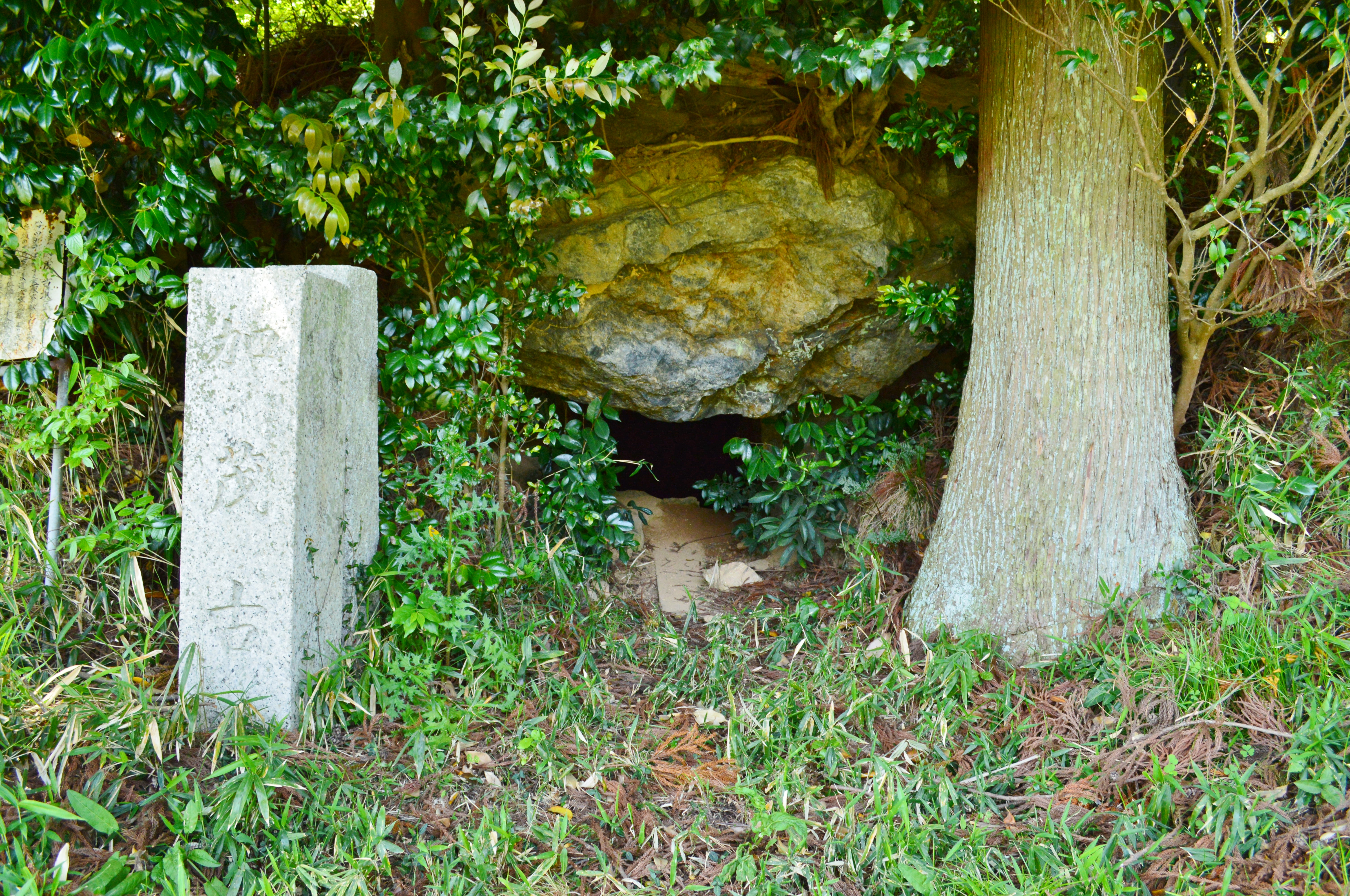 加茂南古墳 石室入り口